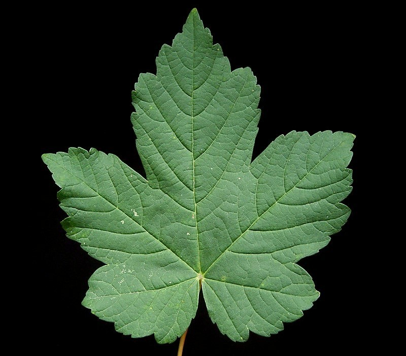 Acer pseudoplatanus